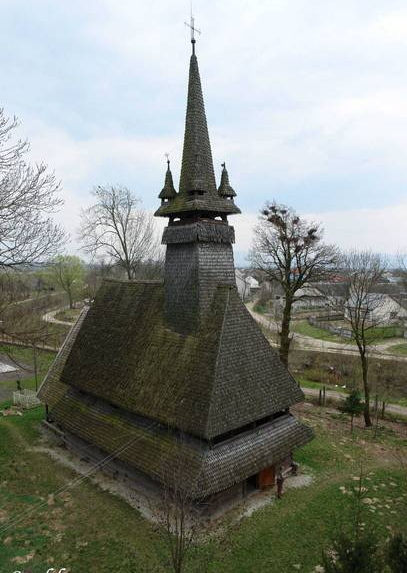 Szeklence